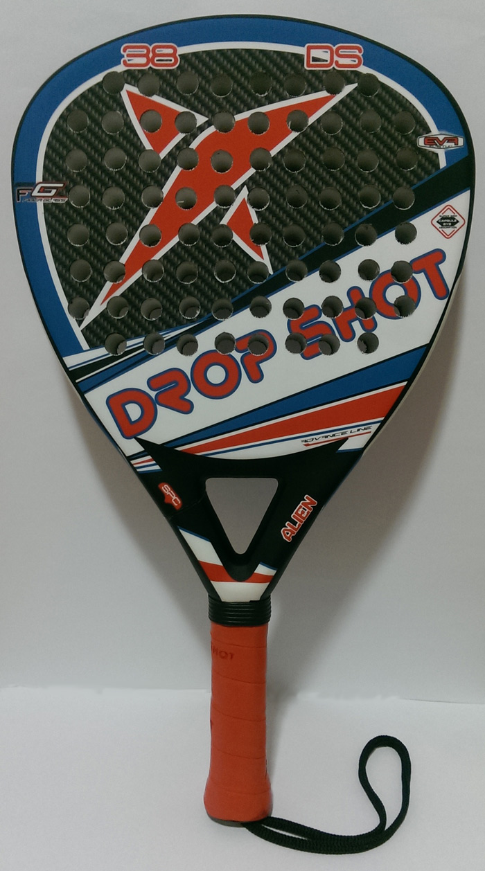 Pala de padel